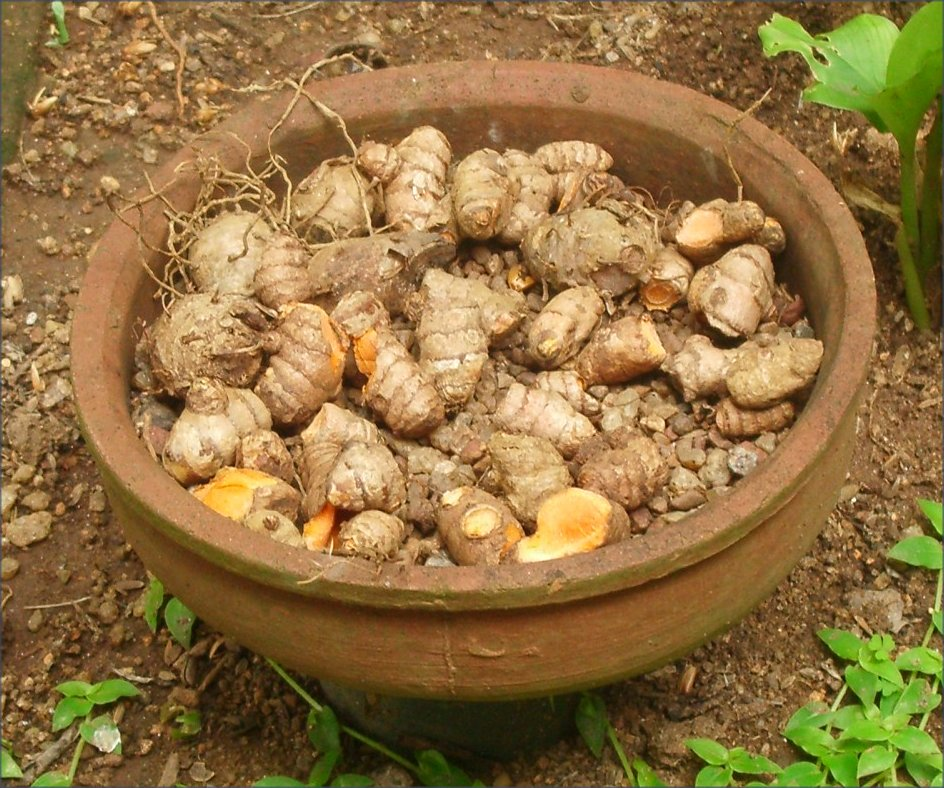 Especies, foto feta per J. Ollé el juliol del 2006